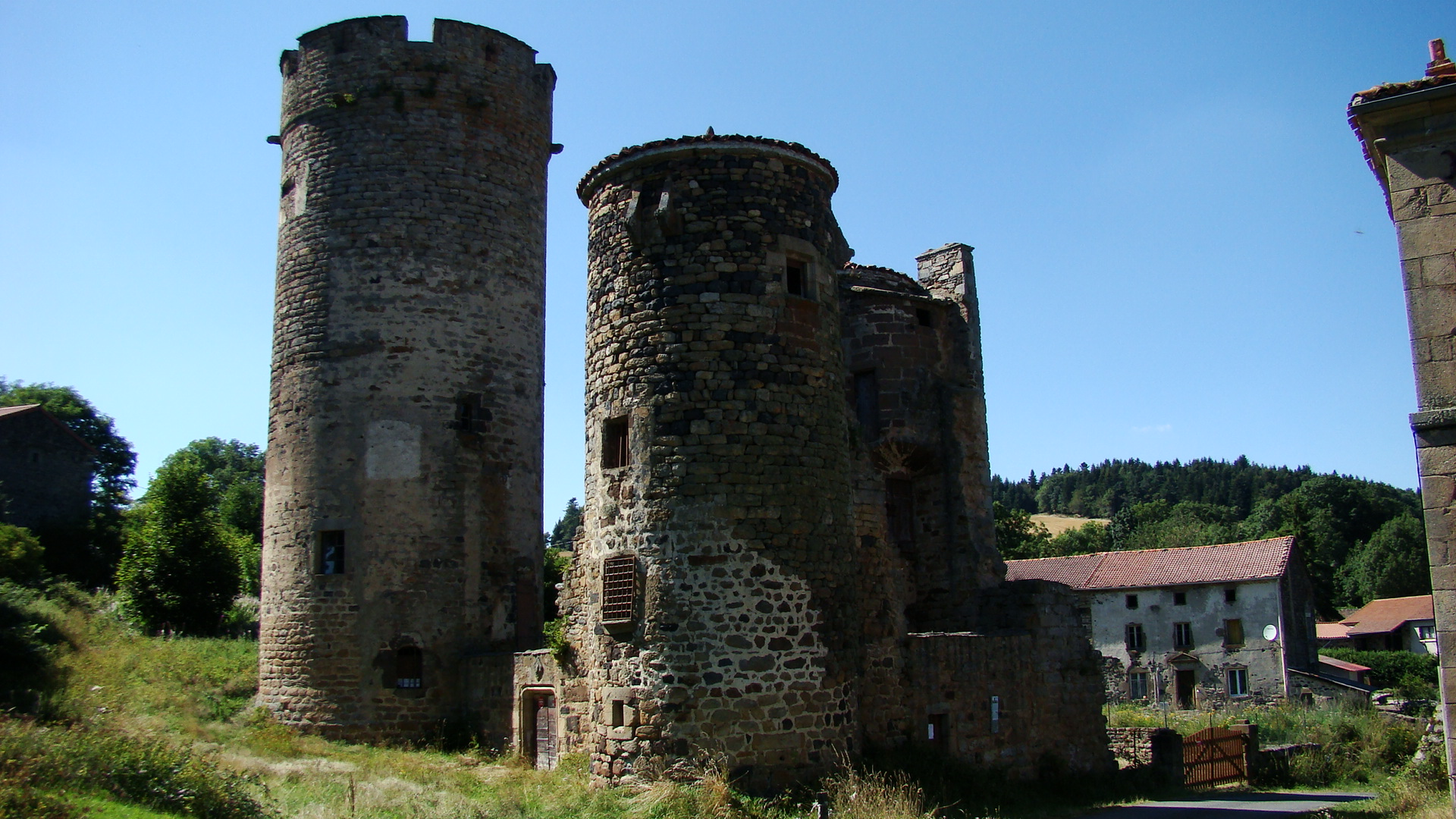 Ruines du château de Mercoeur situé sur les hauteurs de Saint-Privat-d'Allier